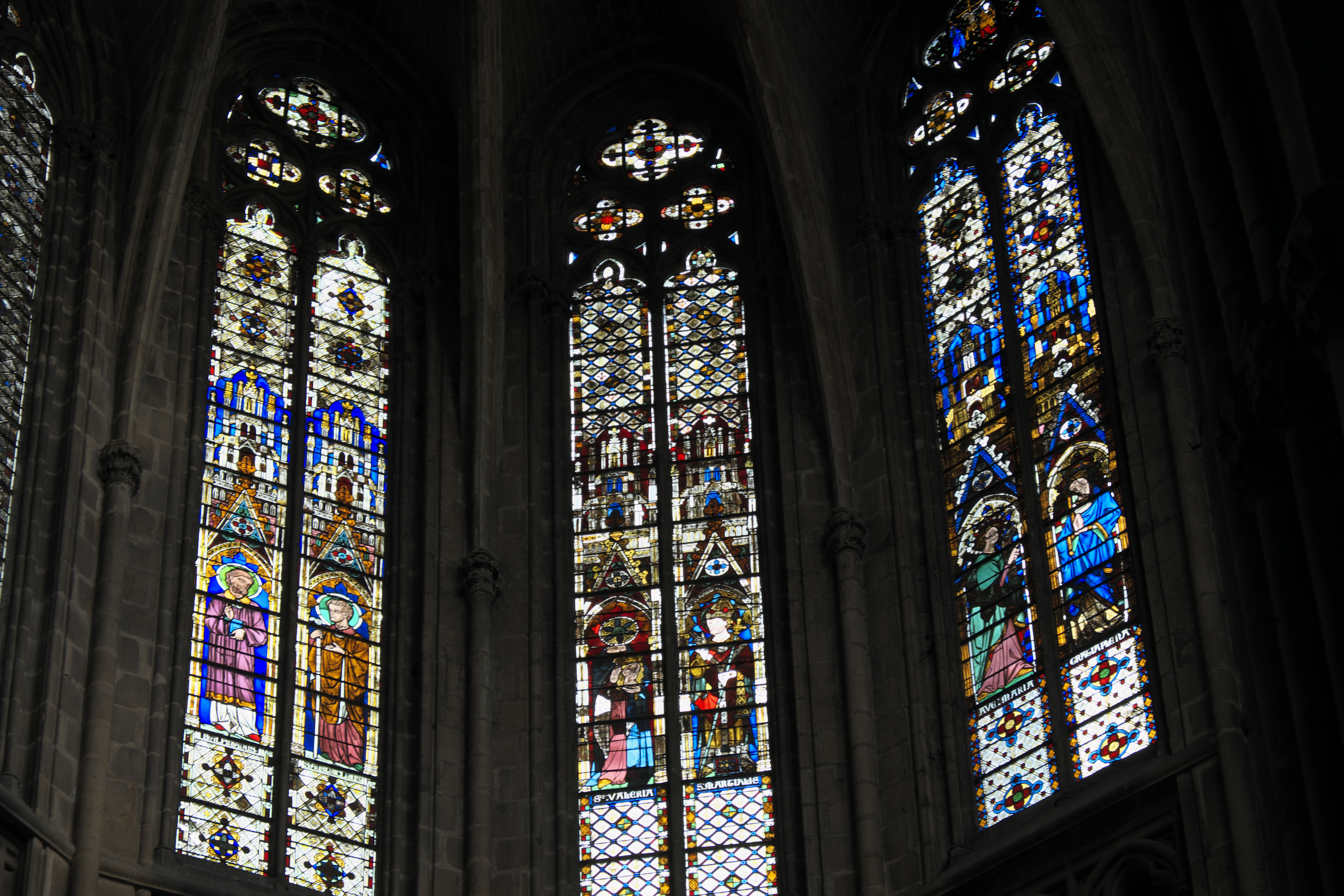 Kathedrale Saint-Étienne in Limoges im Département Haute-Vienne (Nouvelle-Aquitaine/Frankreich), Bleiglasfenster mit Teilen aus dem 14,/15. Jahrhundert; Darstellung: Heiliger Alpinian von Limoges, heiliger Austriclinianus (baie 303, links); Heilige Valeria von Limoges, heiliger Martial von Limoges (baie 301, Mitte); Verkündigung (baie 300, rechts)